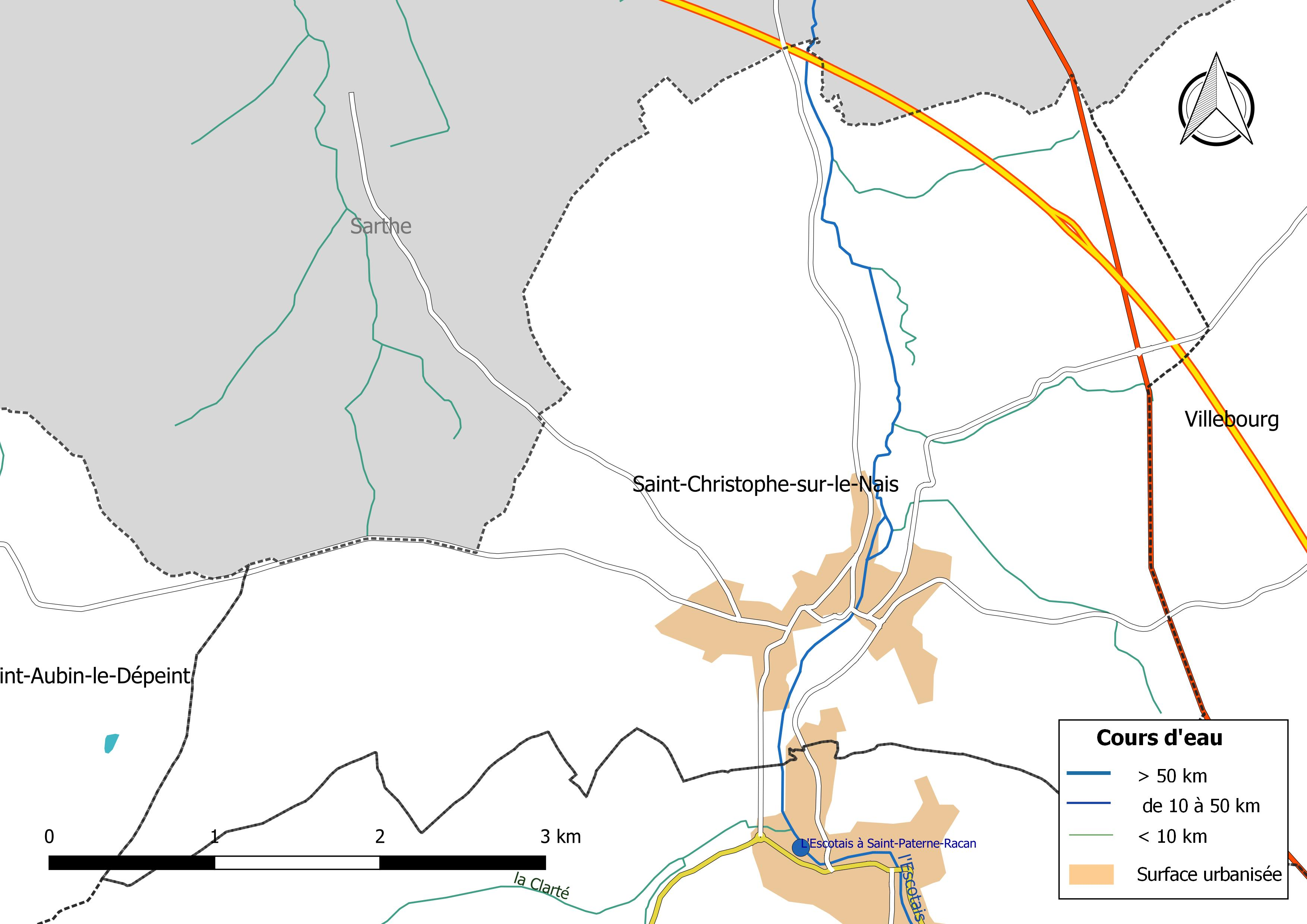 Carte du réseau hydrographique de la commune de Saint-Christophe-sur-le-Nais (France).